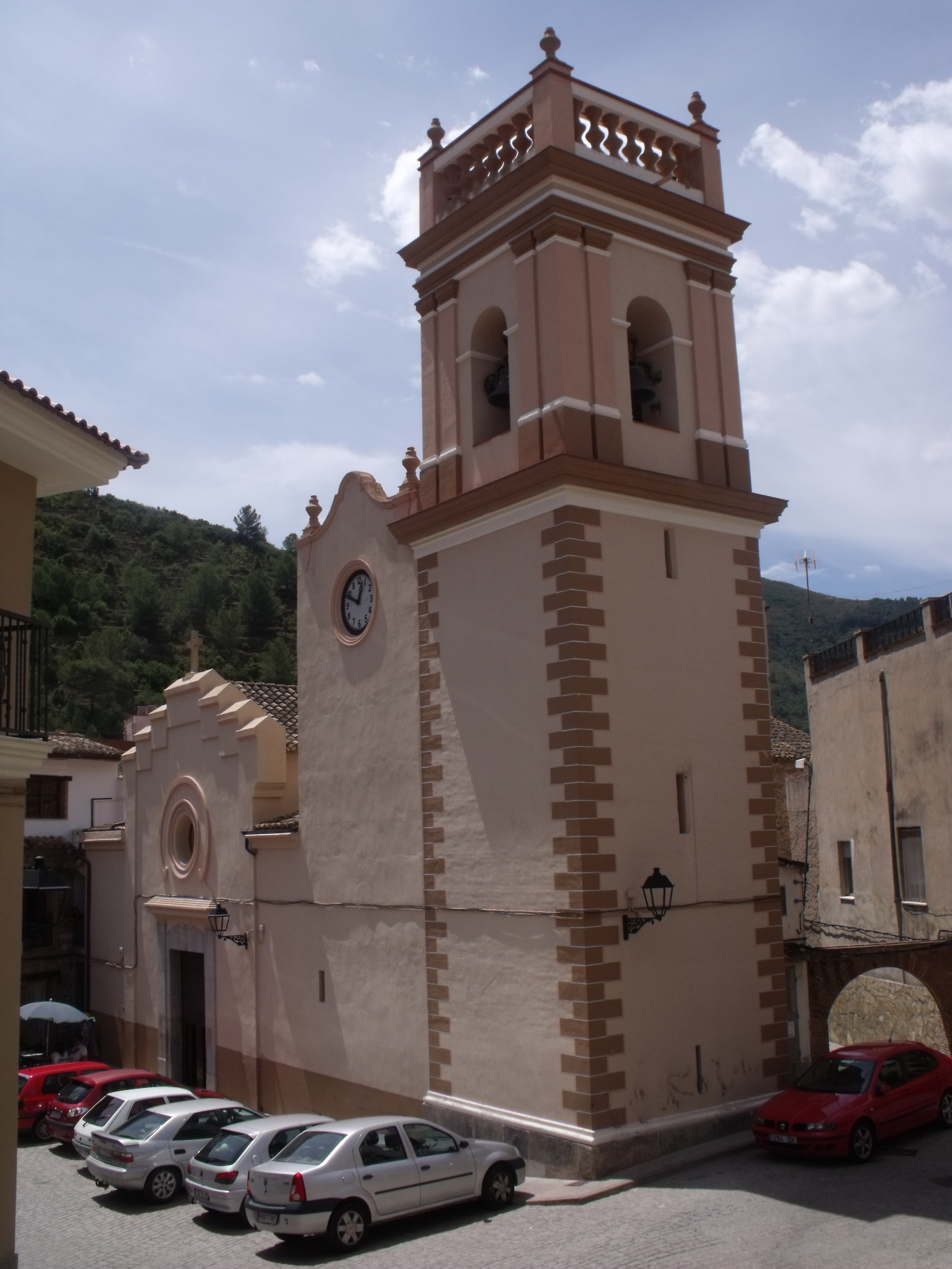 Iglesia parroquial